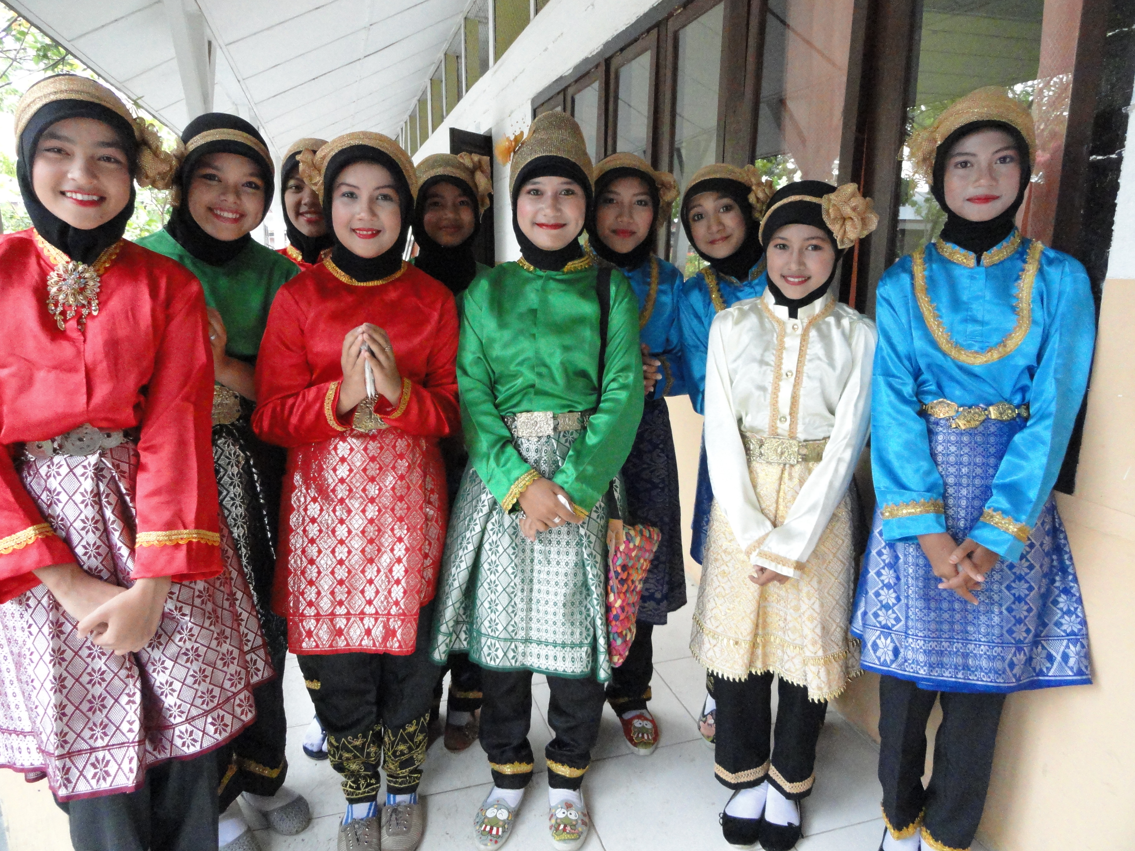 Indonesia